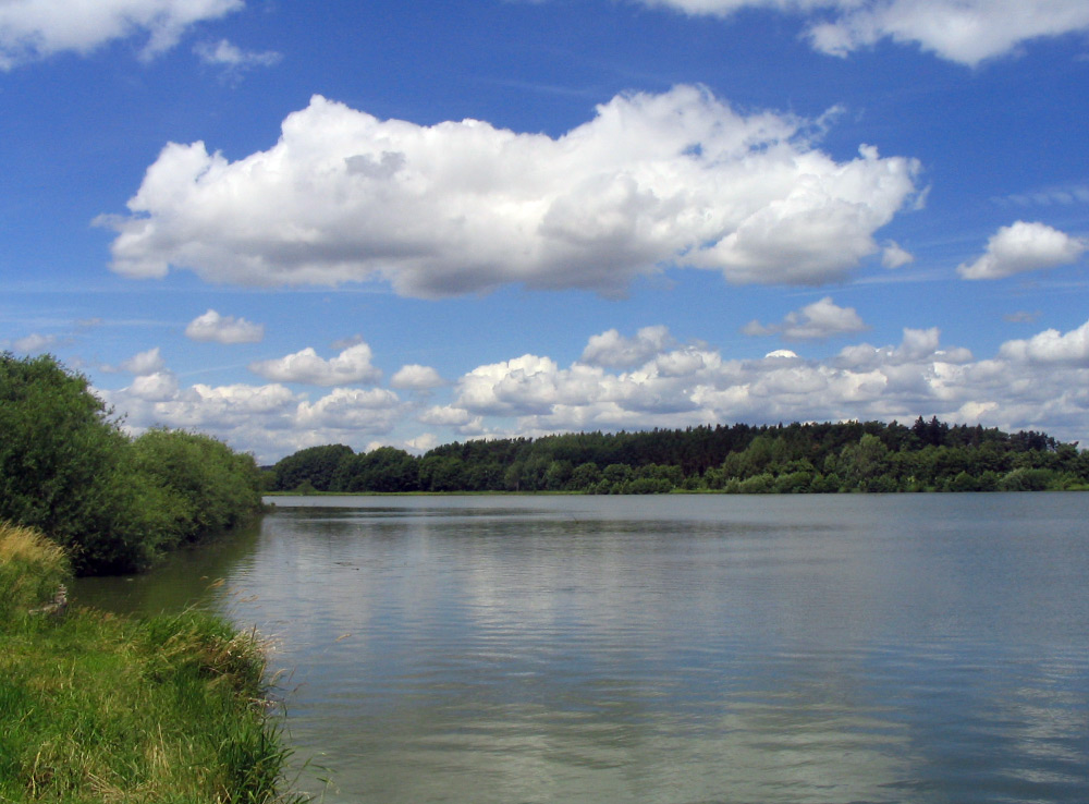 Touškovský rybník u Vsi Touškova, v okrese Plzeň-jih.